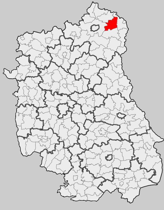 Map of gmina Zalesie, Biała Podlaska county, Lublin voivodship Mapa gminy Zalesie, powiat bialski, województwo lubelskie